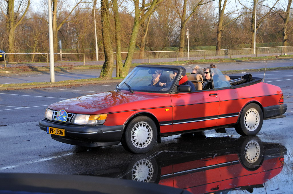 Vanuit Soesterberg hebben vanmiddag honderden Saab-rijders een ‘stille tocht’ naar Muiden gereden voor het noodlijdende automerk. Eigenaar General Motors wil af van het Zweedse Saab, het Nederlandse Spyker heeft belangstelling getoond, maar de partijen zijn het nog niet eens.